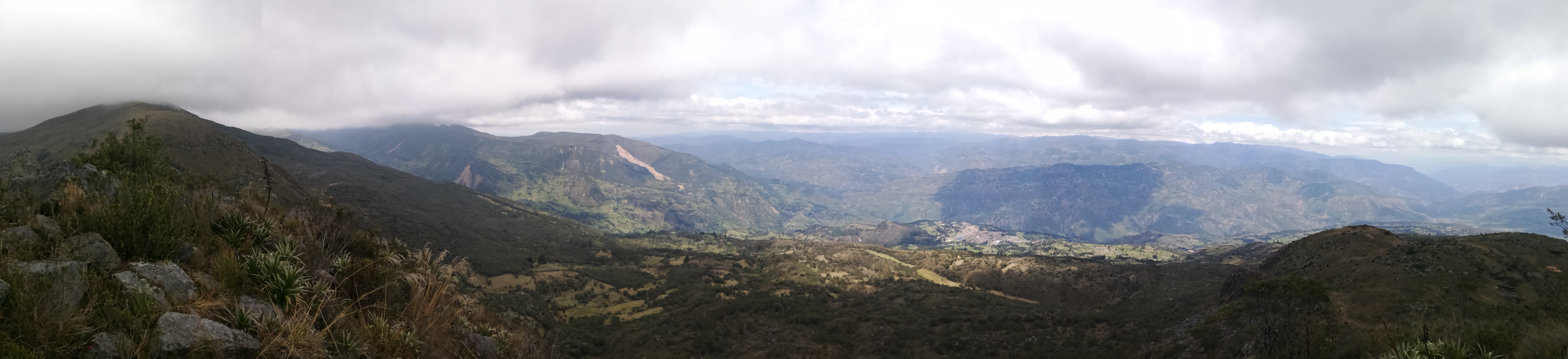 panorámica municipio de socha desde la montaña del condor con vista al cañon del chicamocha